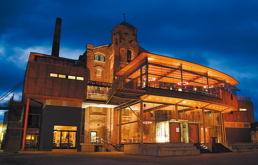 Das Eventzentrum "Alte Brauerei"